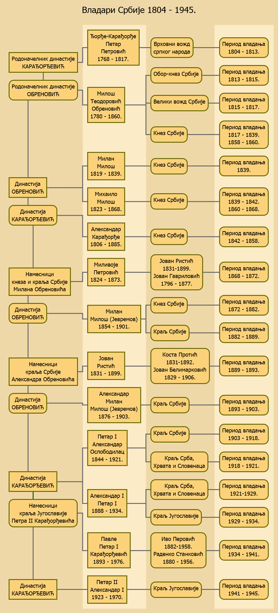 Хронолошки редослед владара Србије у периоду 1804 - 1945.